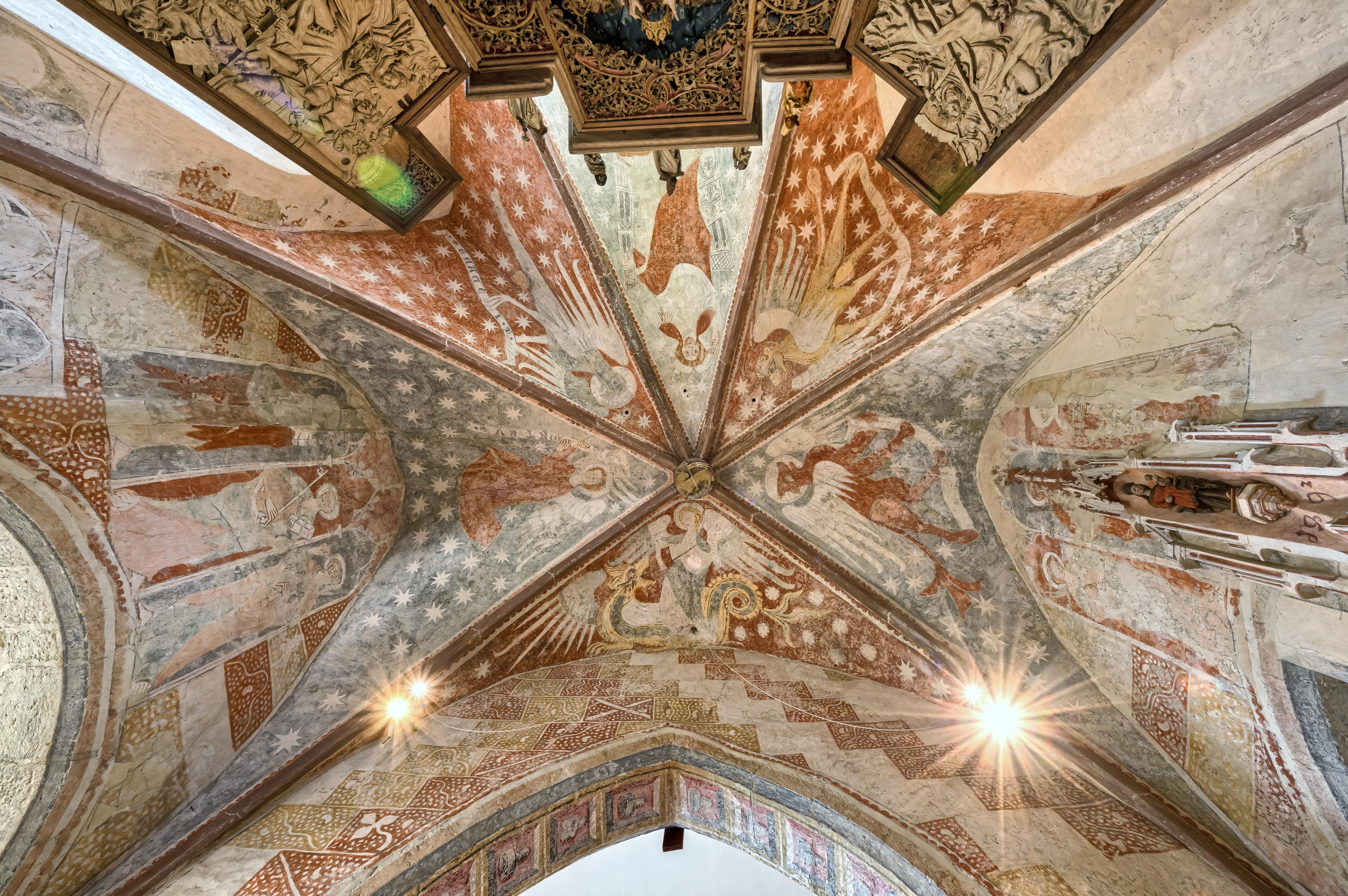 St. Michaelis in Niederrotweil Die Kirche ist einer der ältesten im Breisgau. Entstehung und Frühzeit ist nicht dokumentiert. Die frühromanische Bauform deutet auf das 11. Jahrhundert für dieses Bauwerk. Die erste Urkunde die die Kirche erwähnt stammt aus dem Jahre 1175. Die Kirche liegt am Badischen Teils des Jakobswegs von Rust nach Breisach